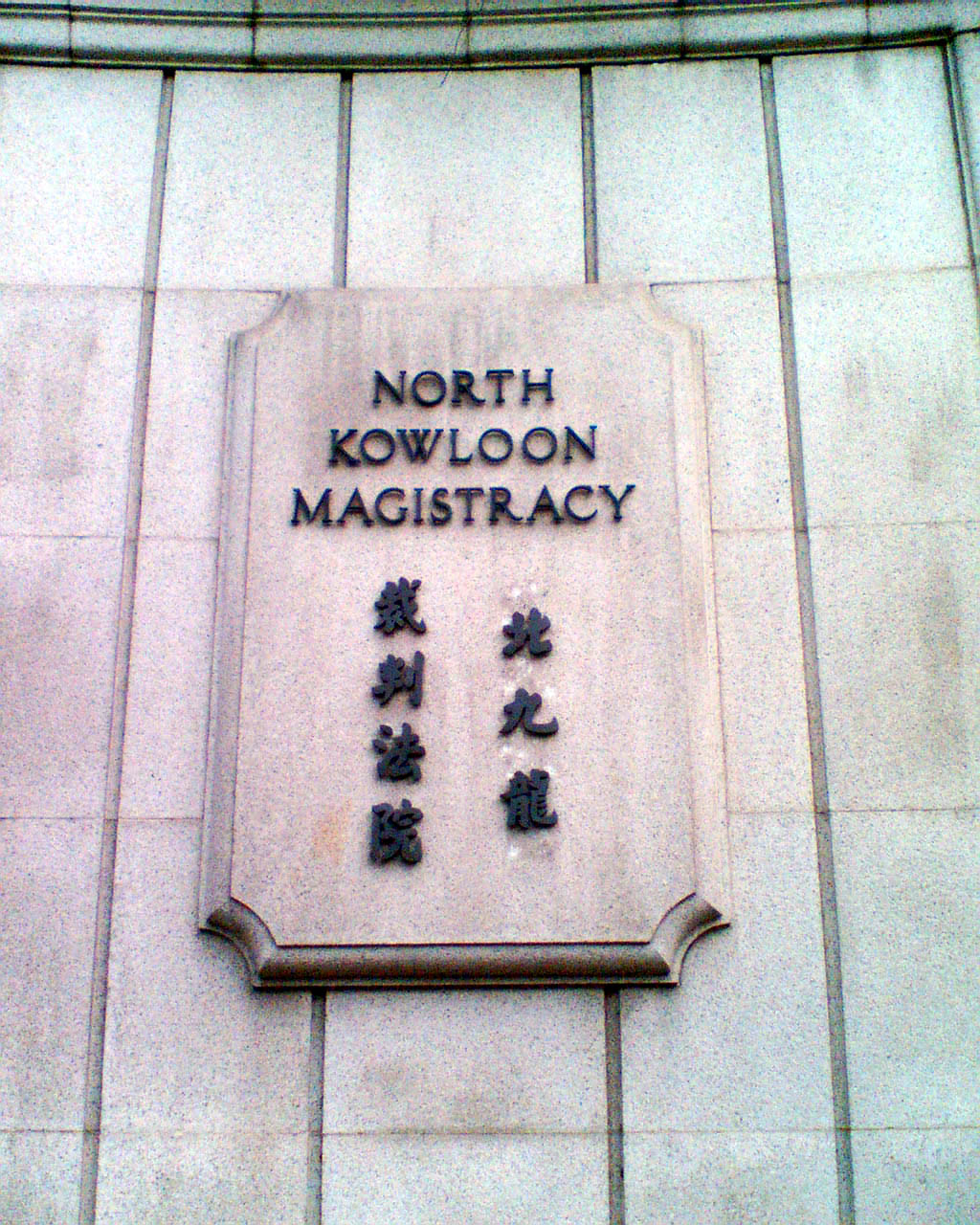 北九龍裁判法院名牌